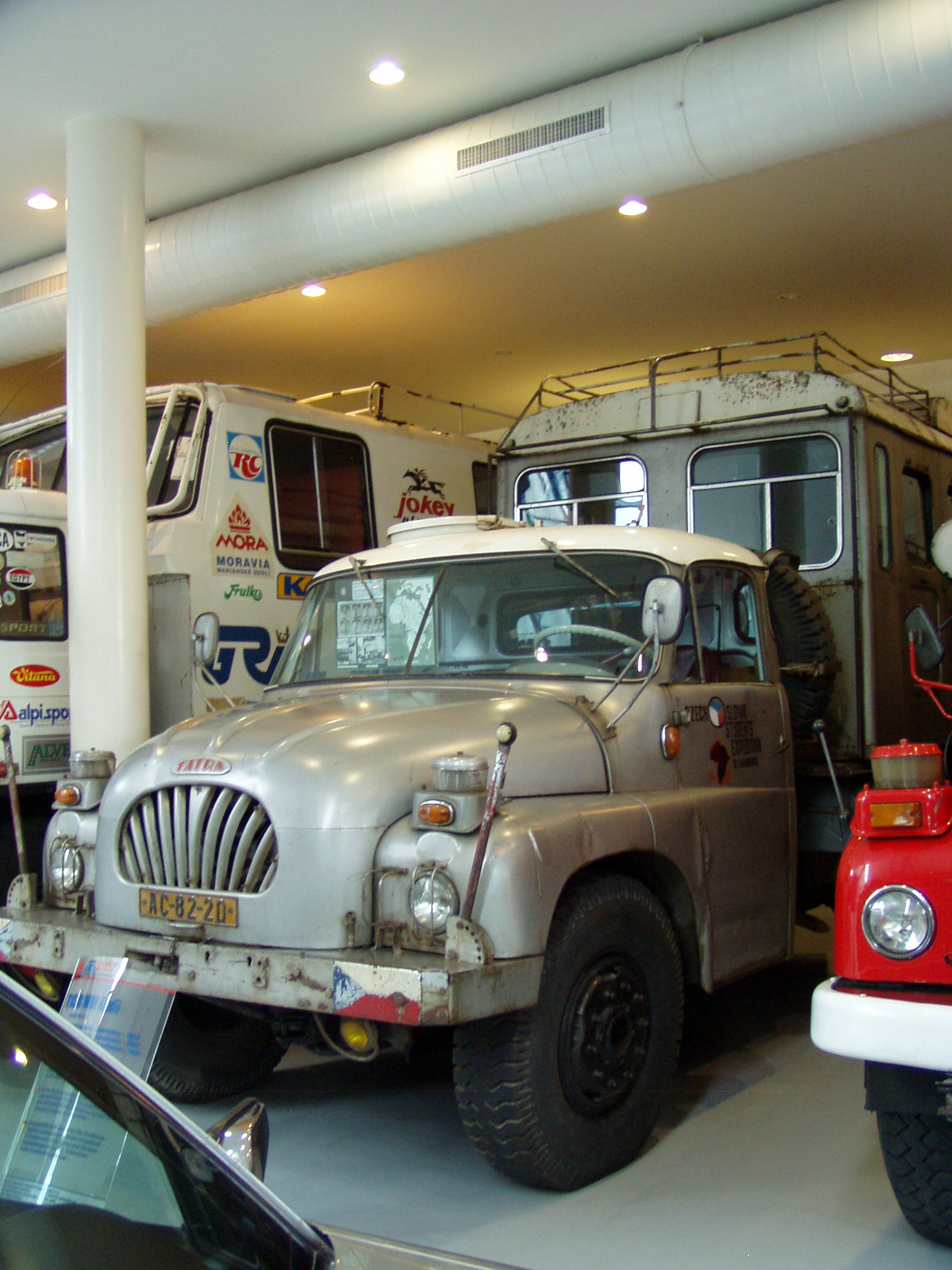 Tatra 138 Lambarene